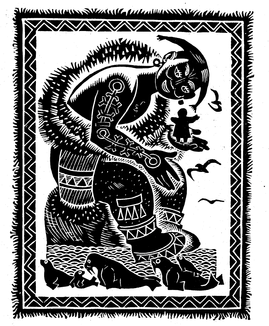 Иллюстрация к книге "Эскимосские сказки и легенды". Художник Д. А. Брюханов